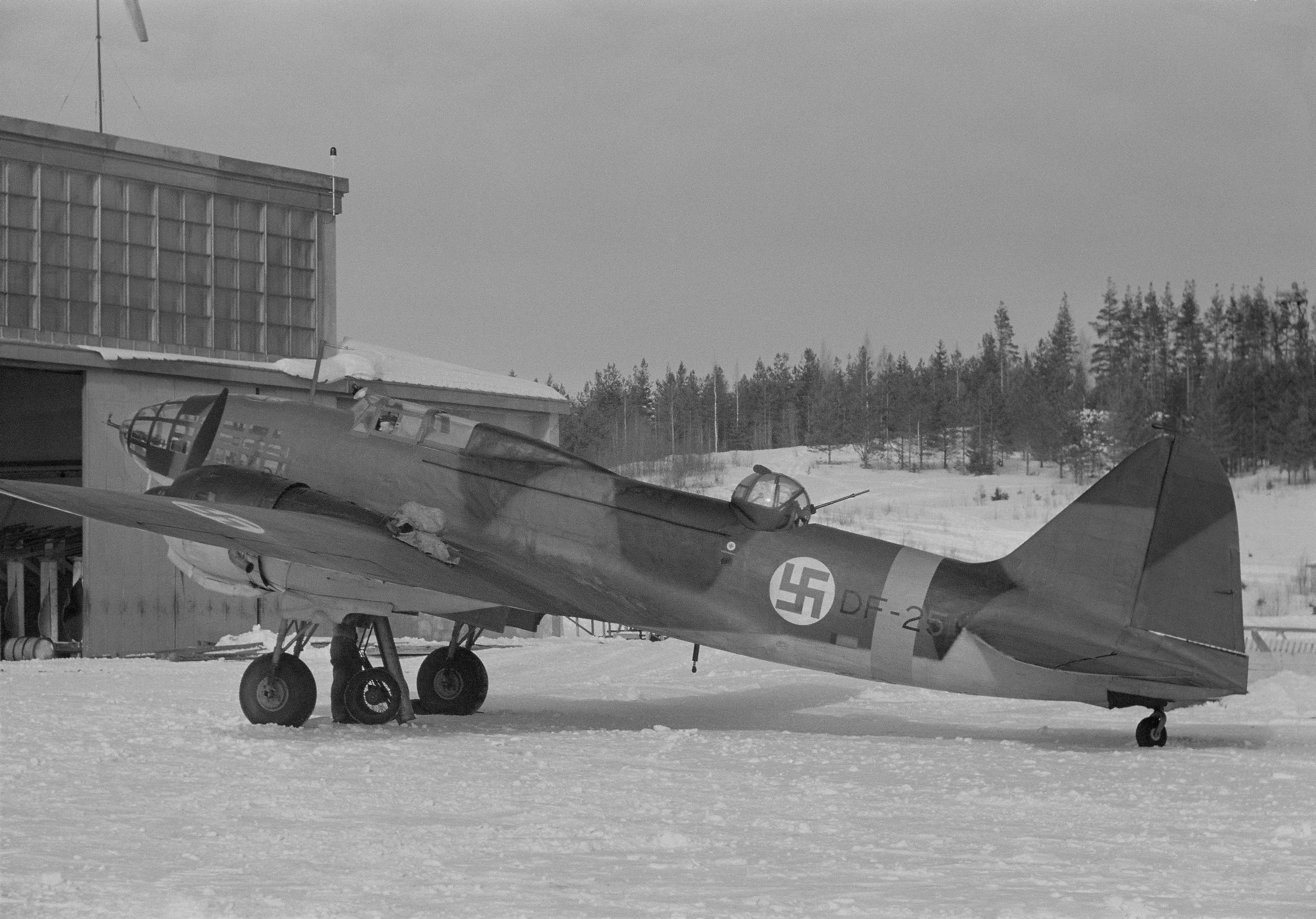 DF-kone takaa. (Kuvassa on Iljushin DB-3F (Il-4)). Kuvauspaikka: Luonetjärven lentokenttä